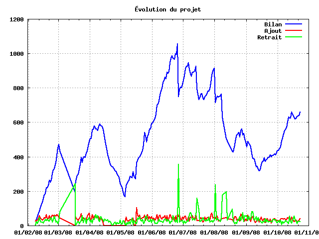 Statistique de l'évolution du Projet:Maintenance/Analyse des créations sous IP Nouvelles statistiques